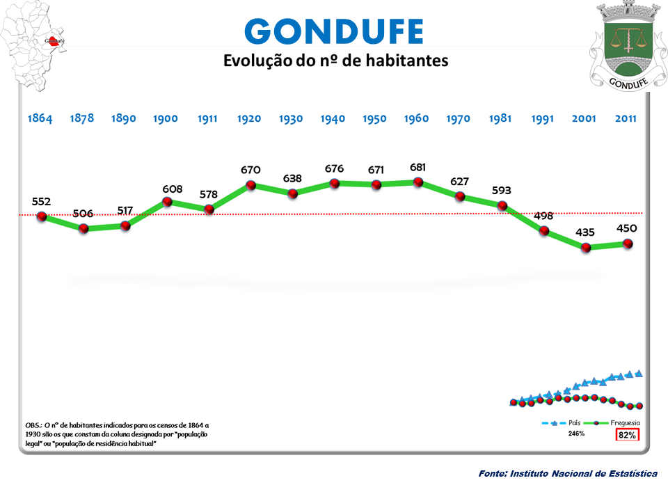 Cenos 1864/2011